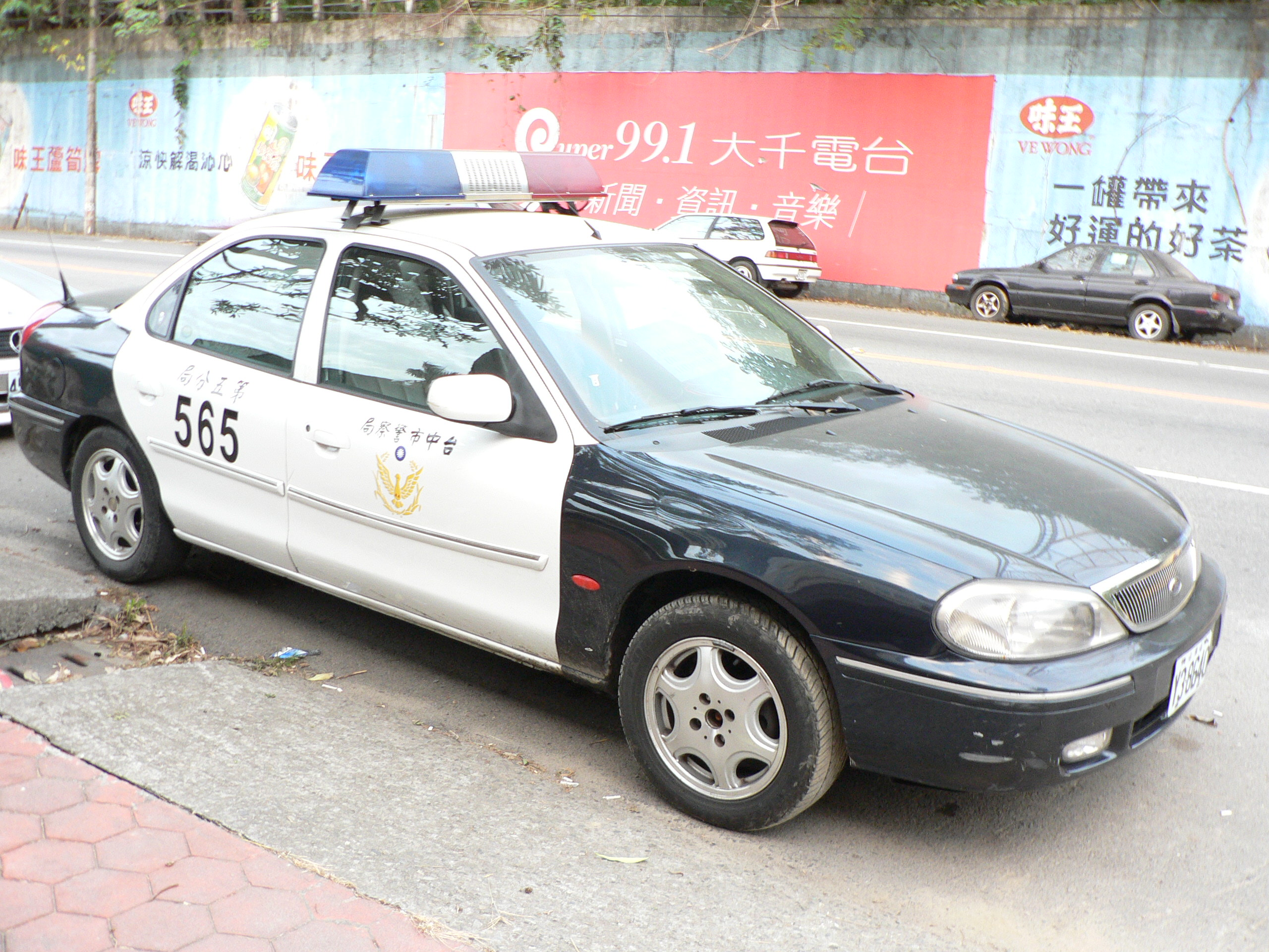 中文（台灣）: 臺中市警察局第五分局福特Mondeo警車Y3-8640，左方是味王手繪廣告與大千電台廣告布條。